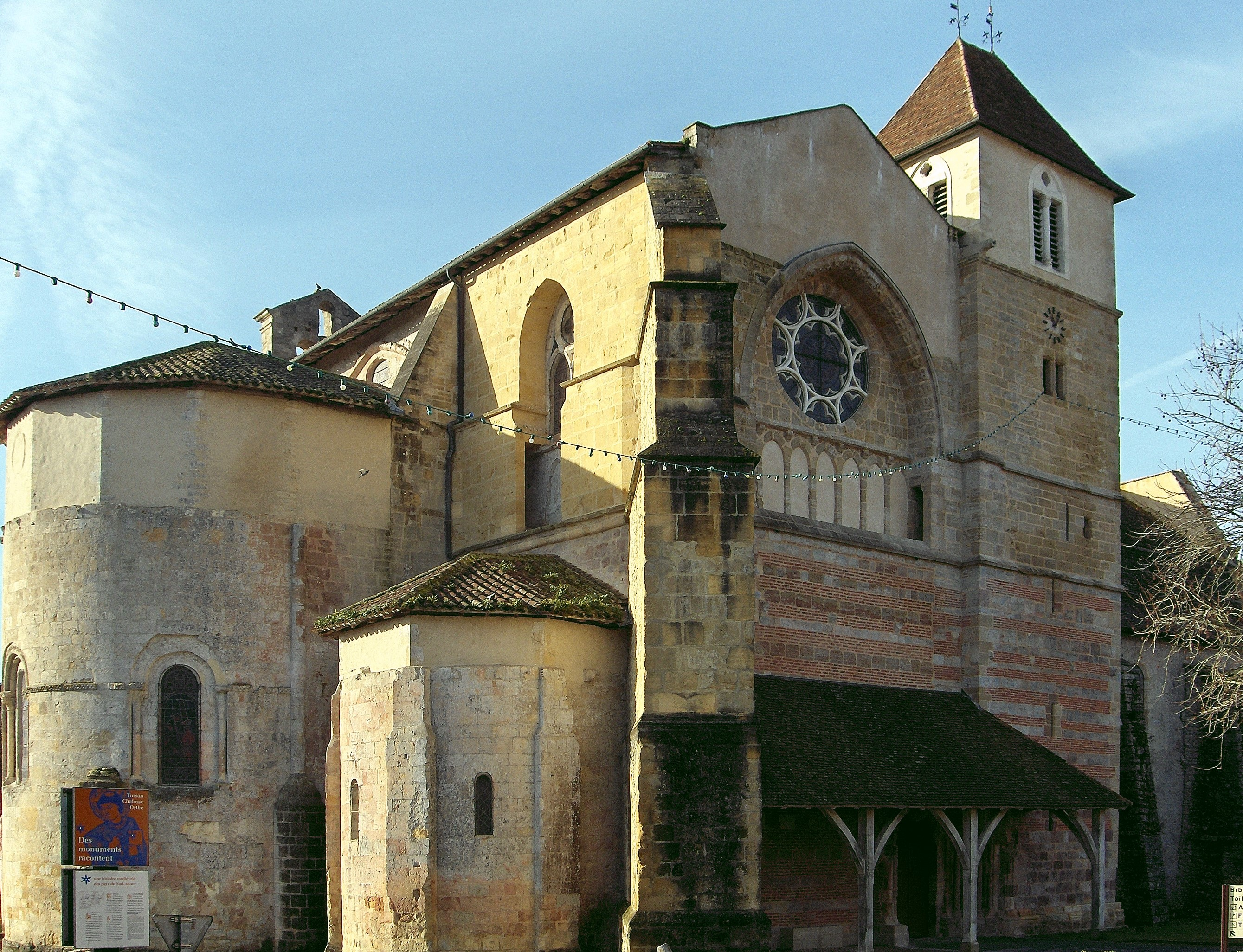 Abbaye Saint Jean de Sorde-l'Abbaye, dans les Landes, en France. Photo prise par Jibi44 en janvier 2007.